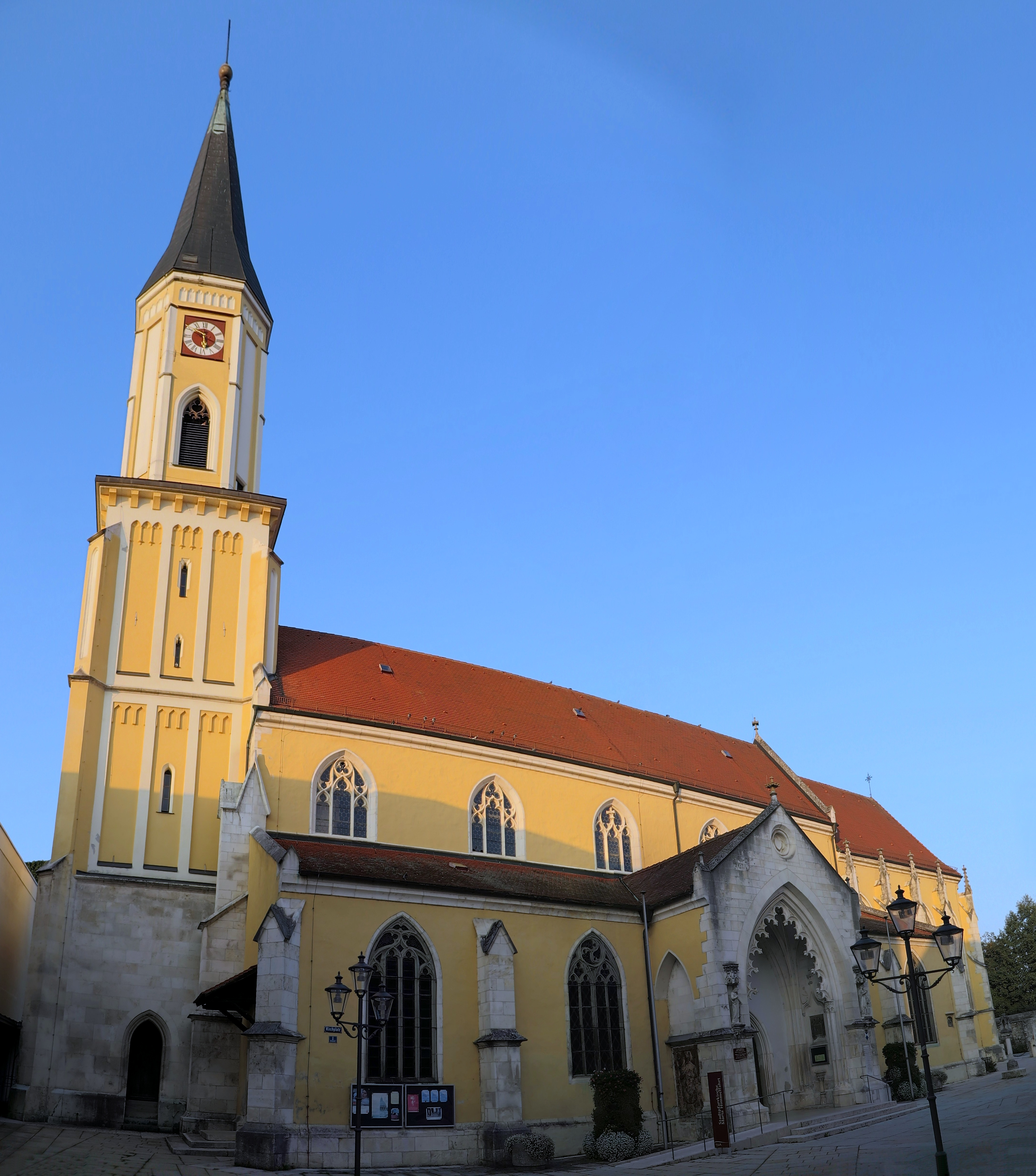 Deutschland, Bayern, Regierungsbezirk Niederbayern, Landkreis Kelheim, Stadt Kelheim, Stadtpfarrkirche Mariä Himmelfahrt